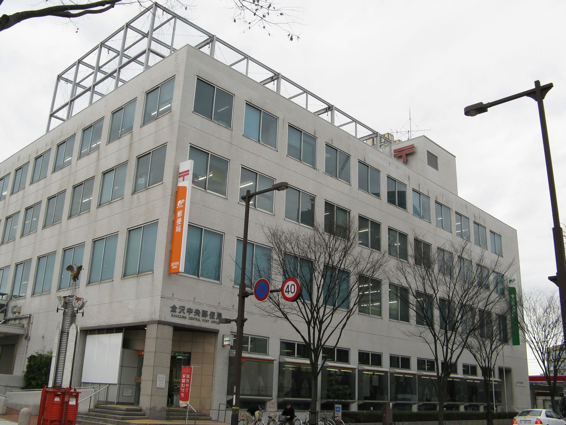 金沢中央郵便局